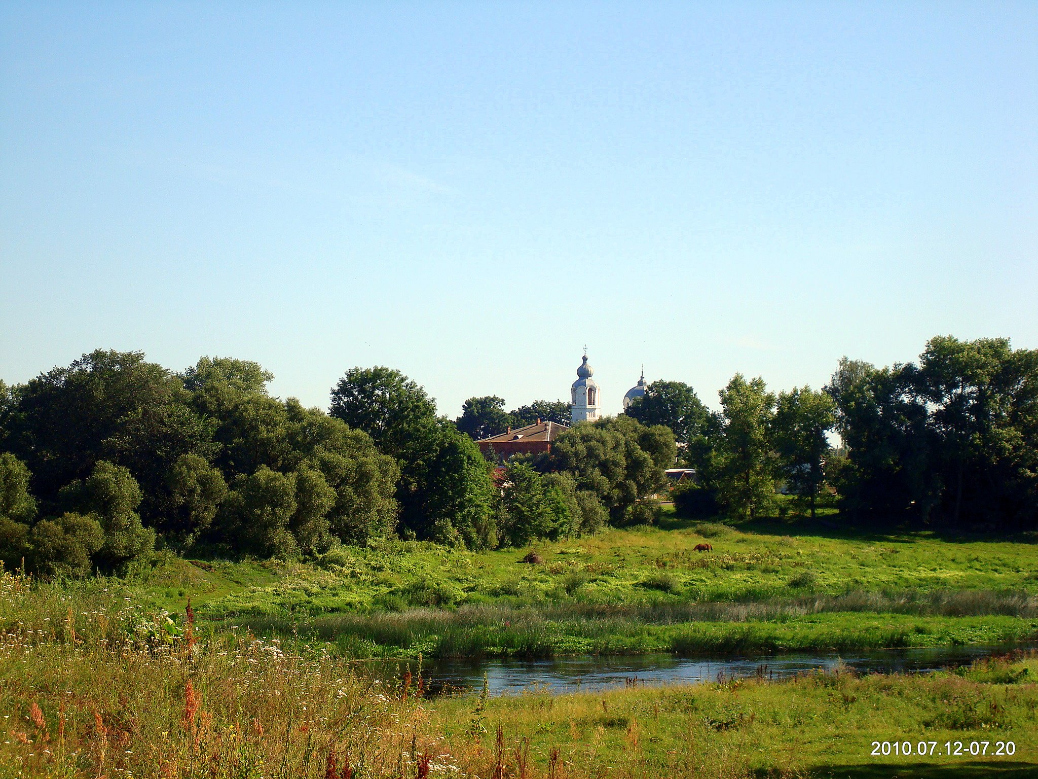 Церковь